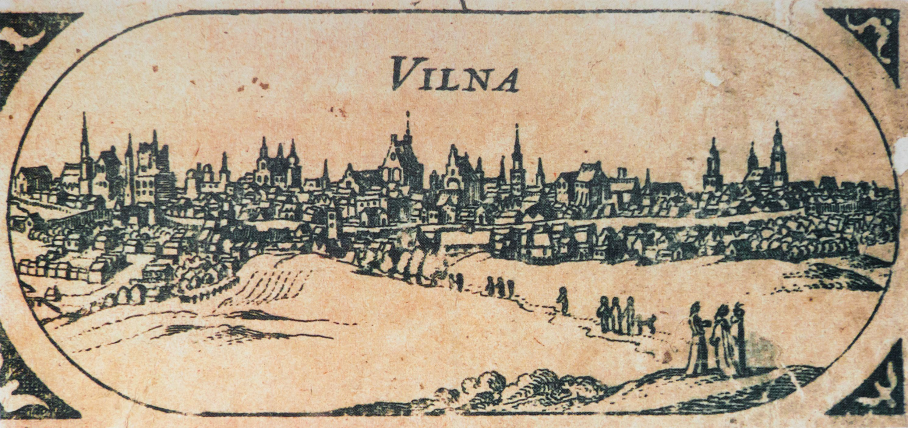 Беларуская (тарашкевіца): Вільня (Vilnia). Панарама на гравюры невядомага нідэрляндзкага мастака